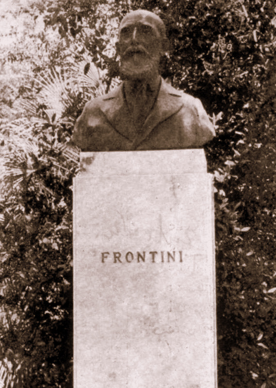 Catania, Giardino (indicato popolarmente Villa) Bellini: Busto di Francesco Paolo Frontini.